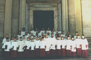 Coro della Cappella Sistina, by Fondazione Bartolucci